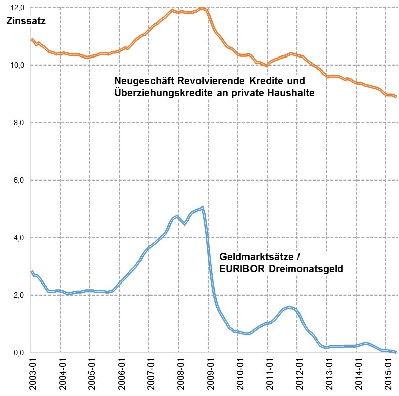 Zeitreihe Gedlmarktzins und Kundenzins